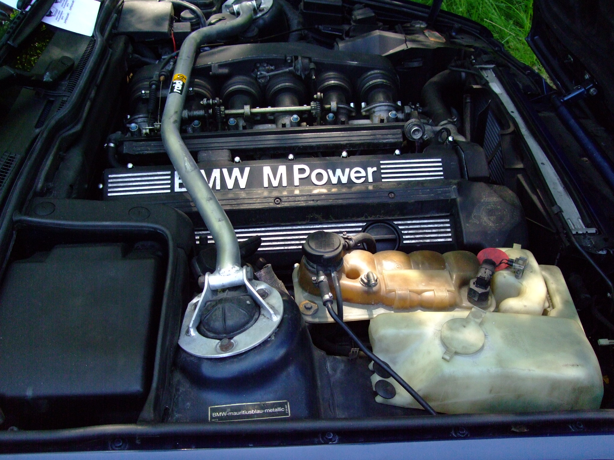 BMW M5 e34, silnik S38B36, poj.3535cm3, sterowanie Bosch Motronic 1.2,moc max.315HP/6900obr/min, max.moment obrotowy 360Nm/4750 obr/min, śr. cylindra 93,5mm, skok tłoka 86mm, stopień sprężania 10,0:1.